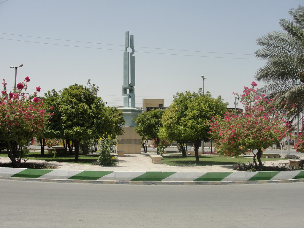 قير/ميدان شهدا